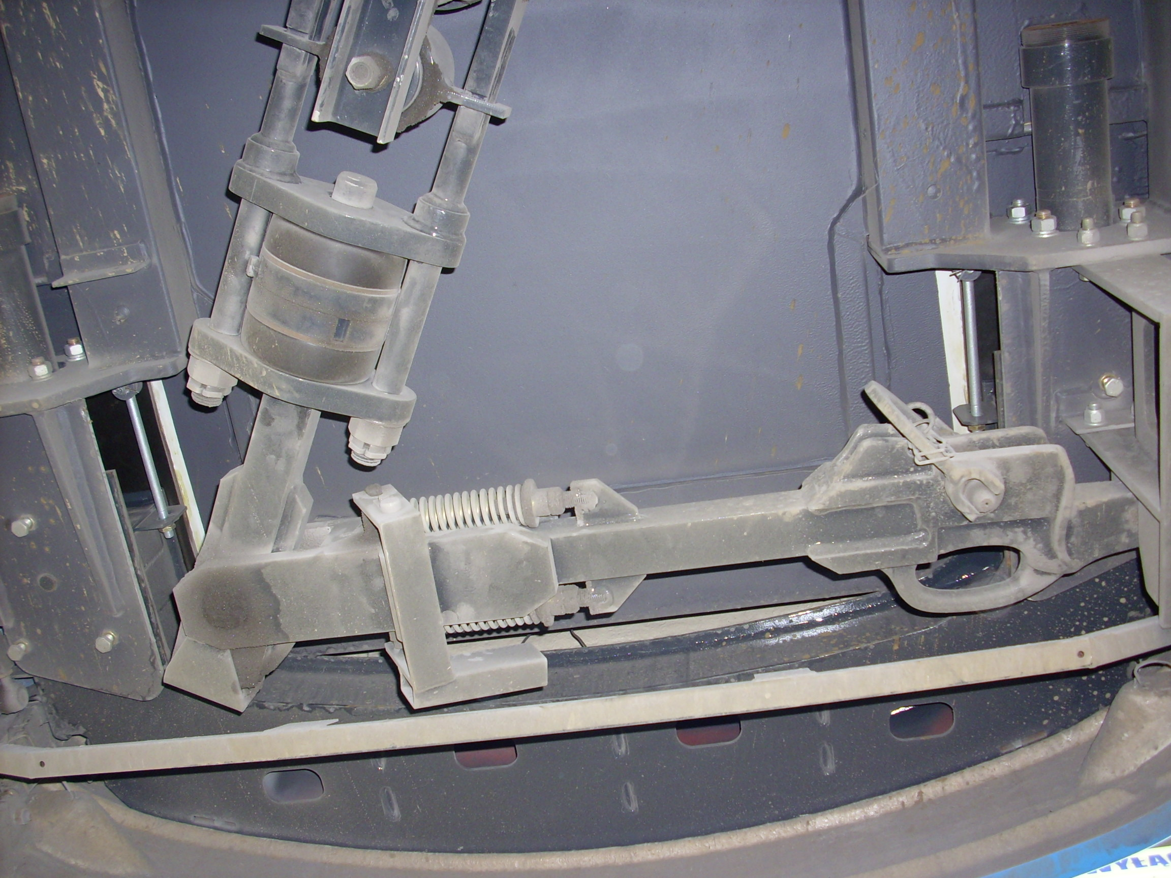 Sprzęg Alberta złożony pod podłogą wagonu tramwaju „Skoda 16T” (MPK Wrocław).